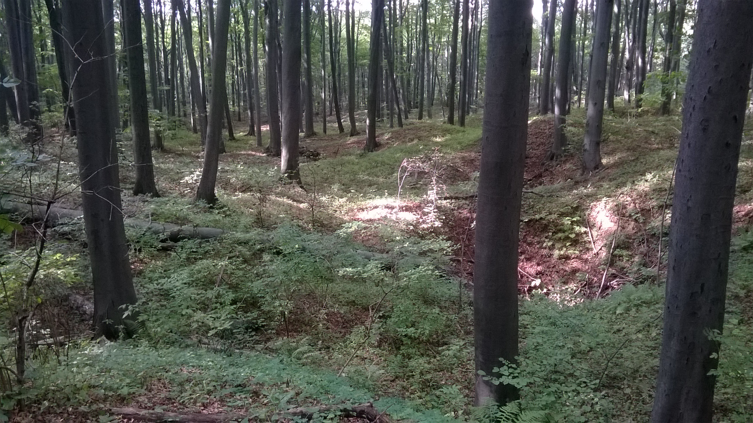 Pogórniczy krajobraz rezerwatu "Segiet" położonego w Tarnowskich Górach i Bytomiu